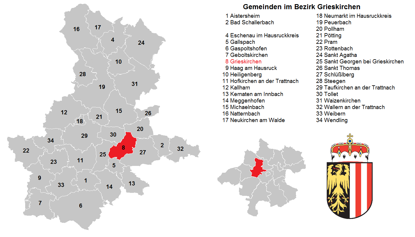 Bezirk Grieskirchen